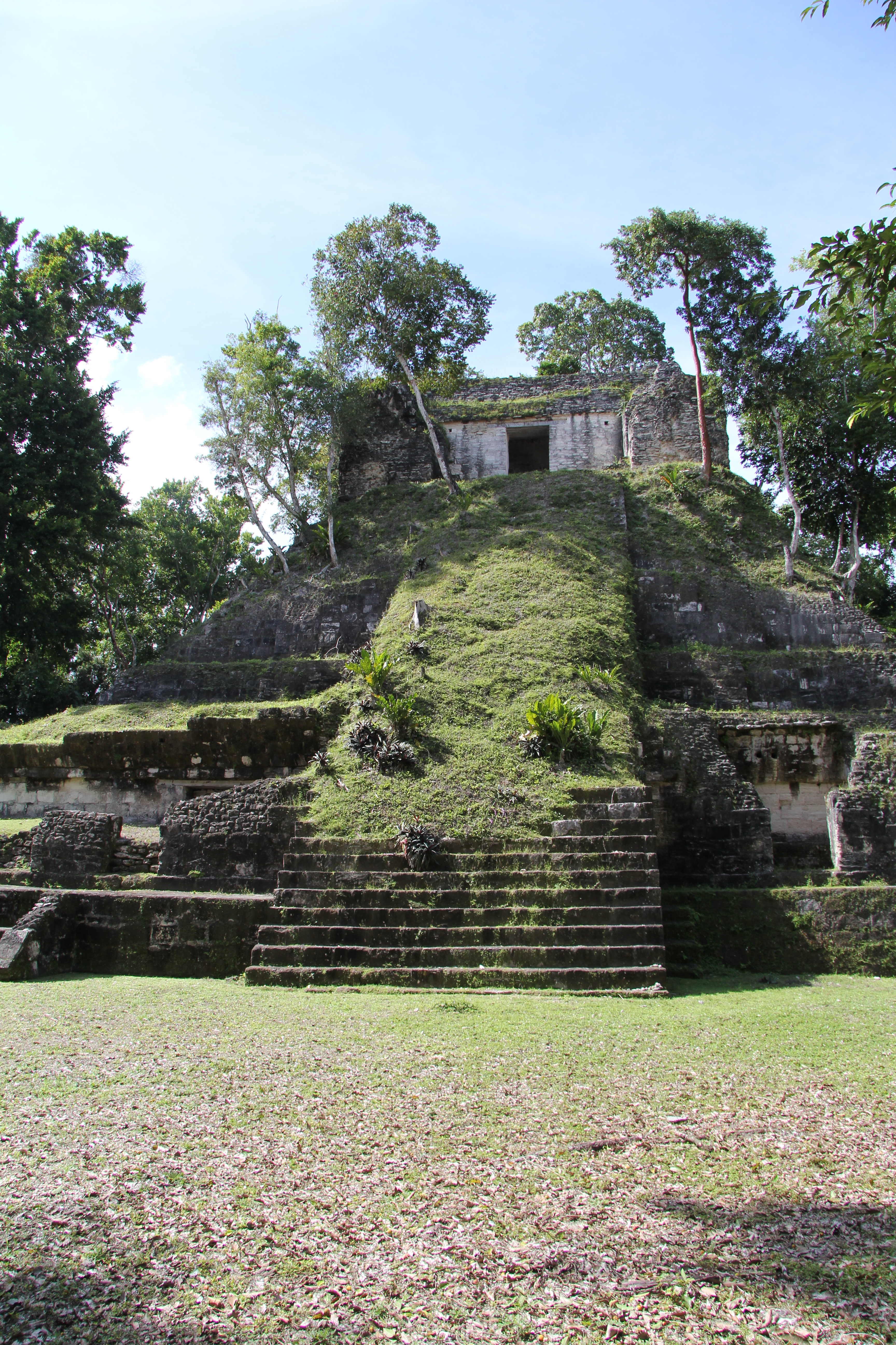 Templo en Nakum, Parque Yaxhá Nakum Naranjo, Reserva de la Biosfera Maya, Petén, Guatemala